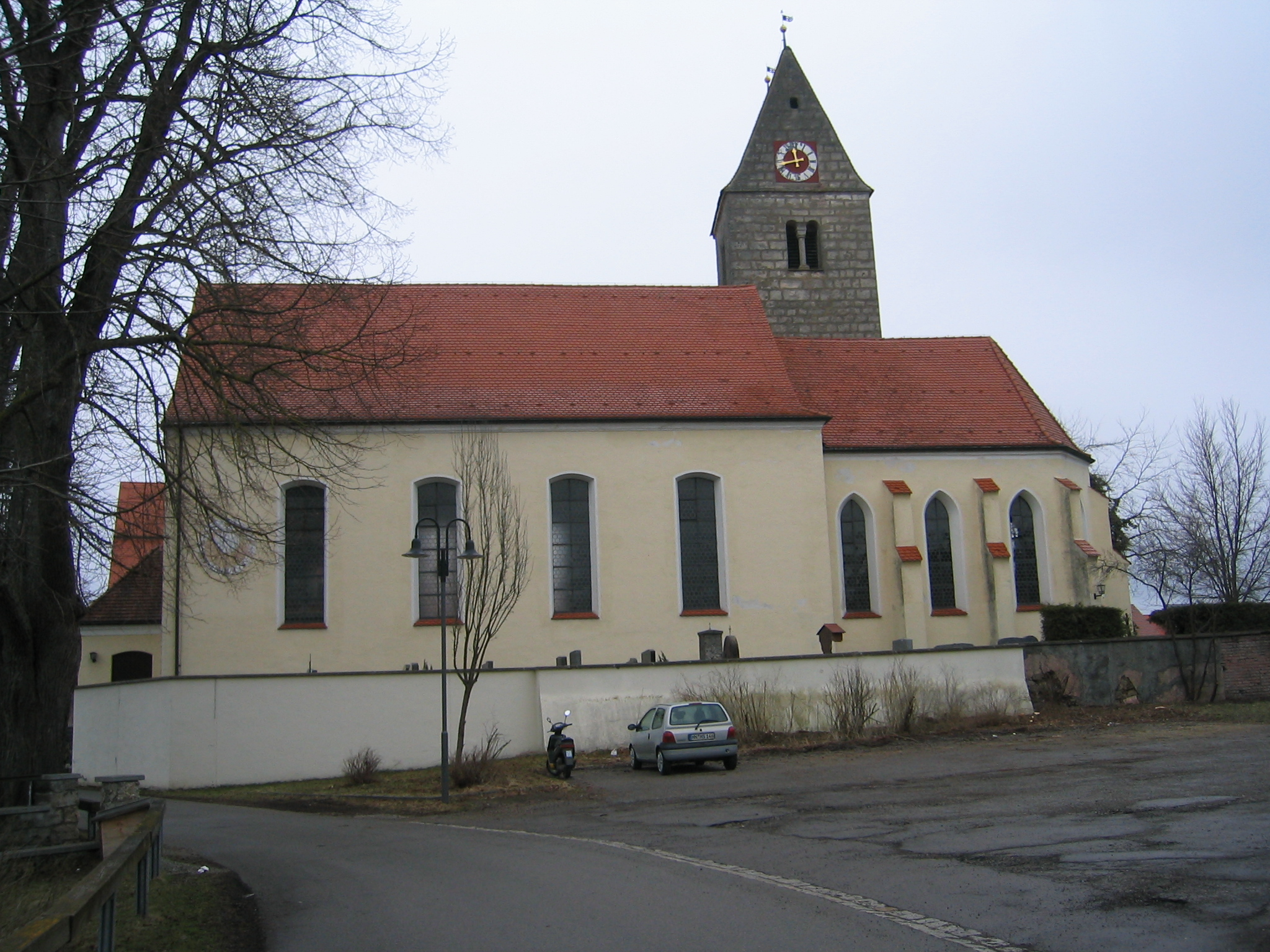 Katholische Kirche Mariä Himmelfahrt in Kronburg-Illerbeuren selbst fotografiert am 30. März 2006